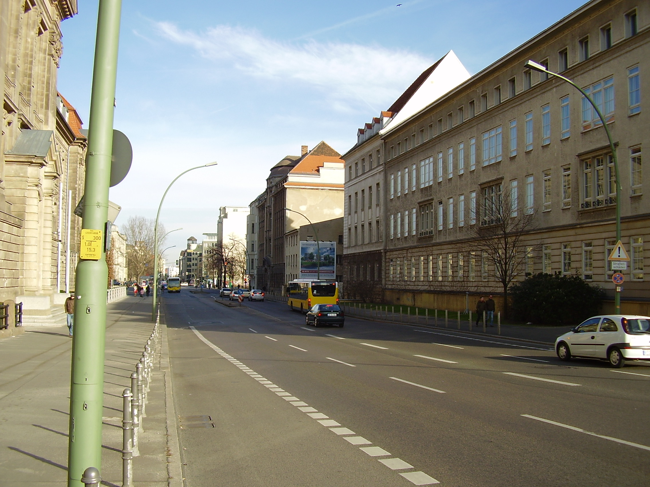 Invalidenstraße, Berlin, blick Richtung Chausseestraße, Richtung Nordosten, ganz links das bundeswehrkrankenhaus Berlin